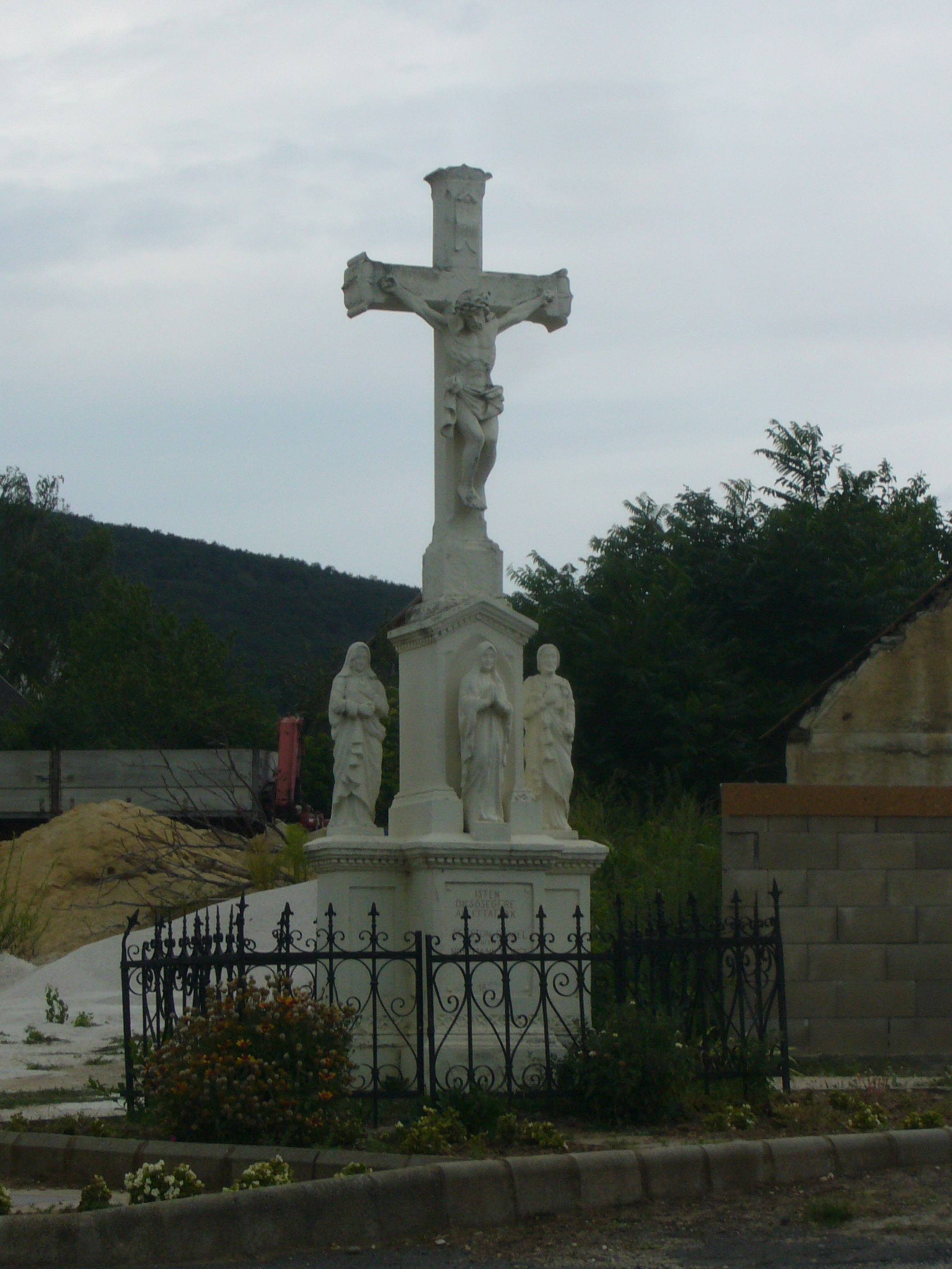 Tagyon kereszt